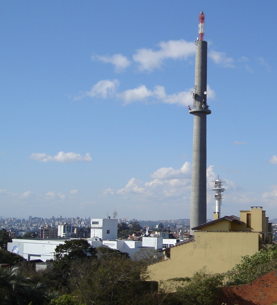 Sede da RBS TV Porto Alegre a partir do mirante do Morro Santa Teresa.